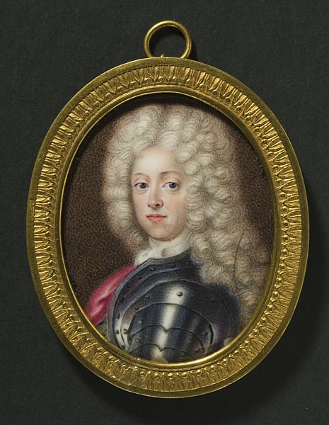 Carl Gustav Bielke, svensk, Född 1683, Död 1754. Miniatyren målad av: Eric Utterhielm, svensk, Född 1662, Död 1717. Nationalmuseums inventarienummer: NMB 2502 Förvärv: Inköp 2000 med Hjalmar och Anna Wicanders donationsmedel